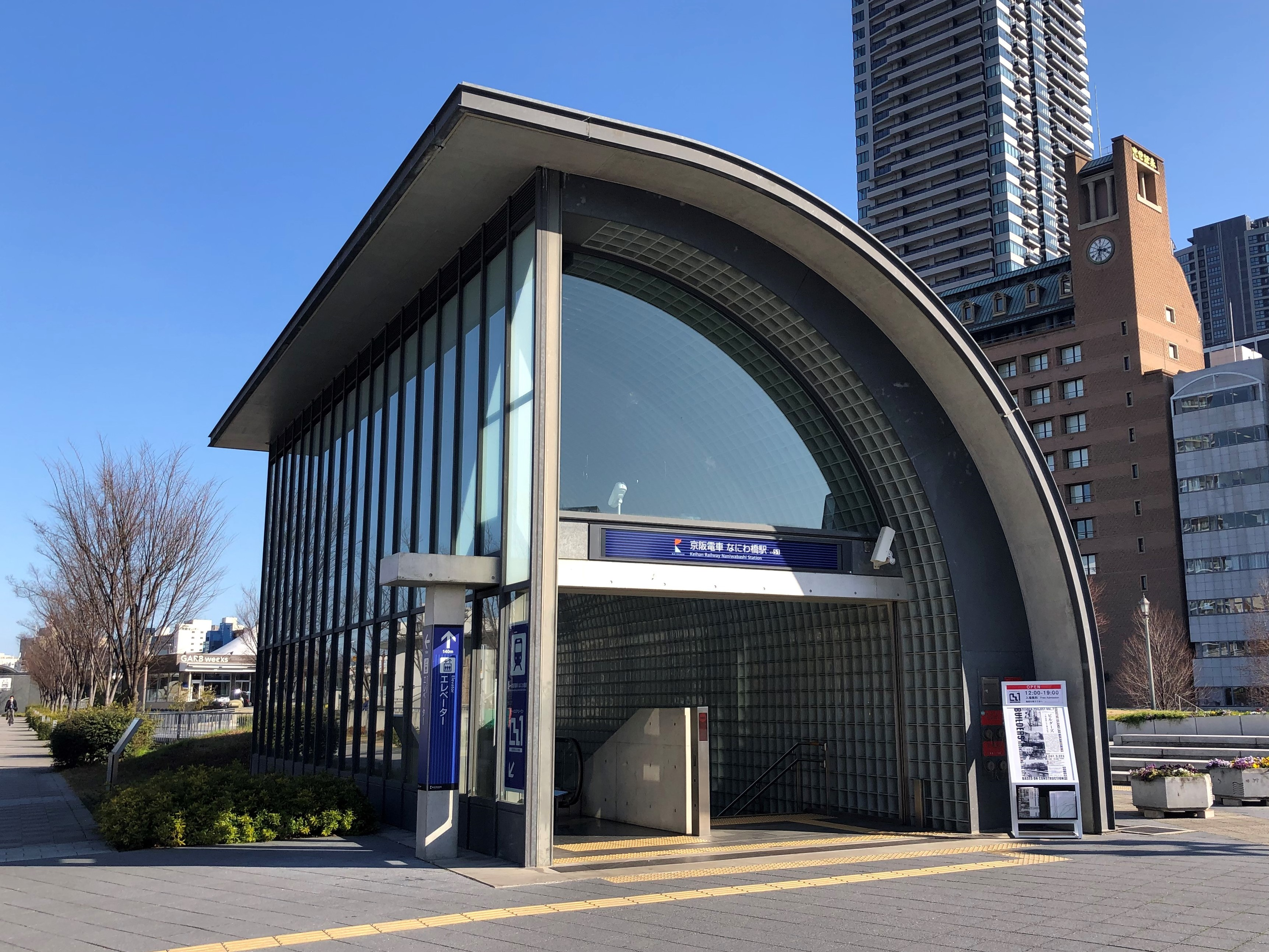 京阪電鉄なにわ橋駅